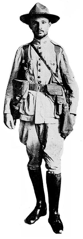 O então capitão Abílio Pereira de Rezende durante a Revolução de 1924